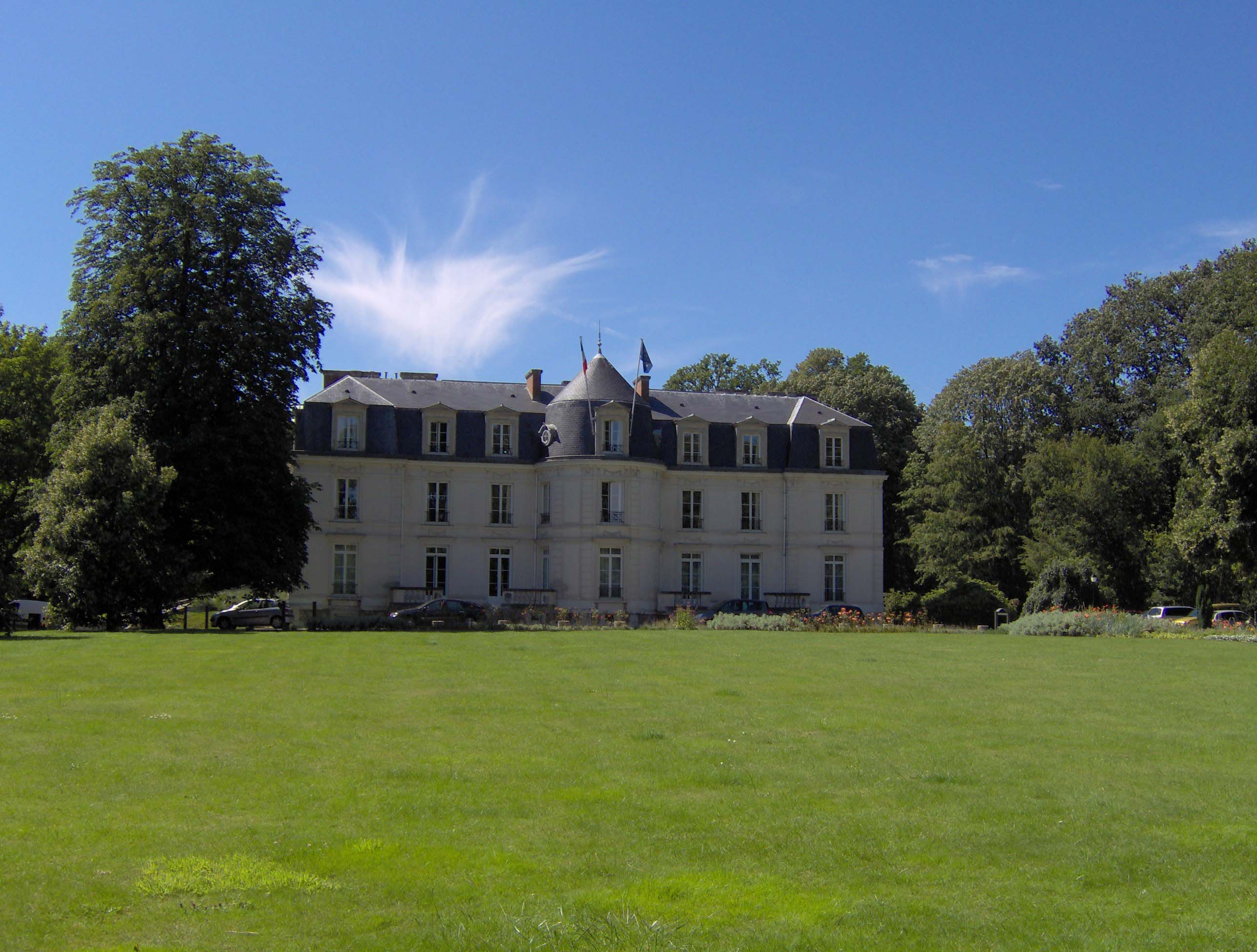 Chateau de Montigny-le-Bretonneux.